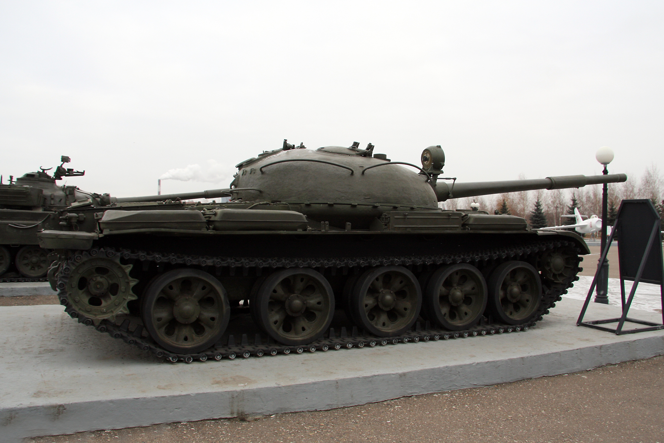 T-62